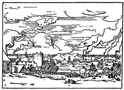 Illustration by Jacobus Hendrik Pierneef from Trekkerswee by Totius From the poem Goue Gode: Bo-op die grond rys al 'n stad / wat op die heuwels skitter-blink.